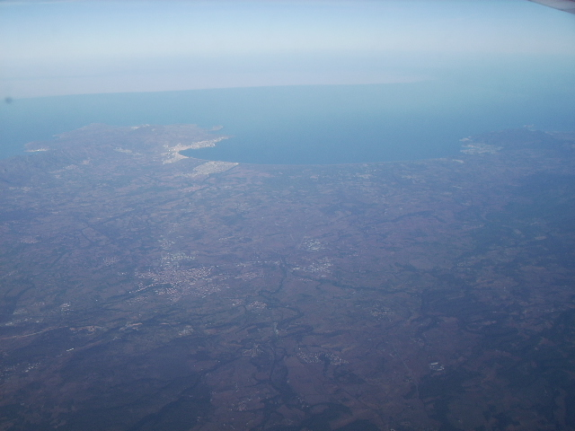 Vista aérea de la península del cabo de Creus y del golfo de Roses